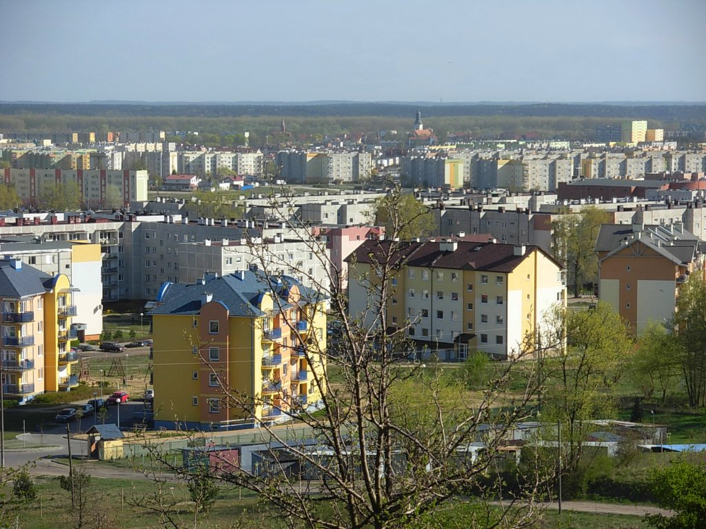 Widok ze Zbocza Fordońskiego